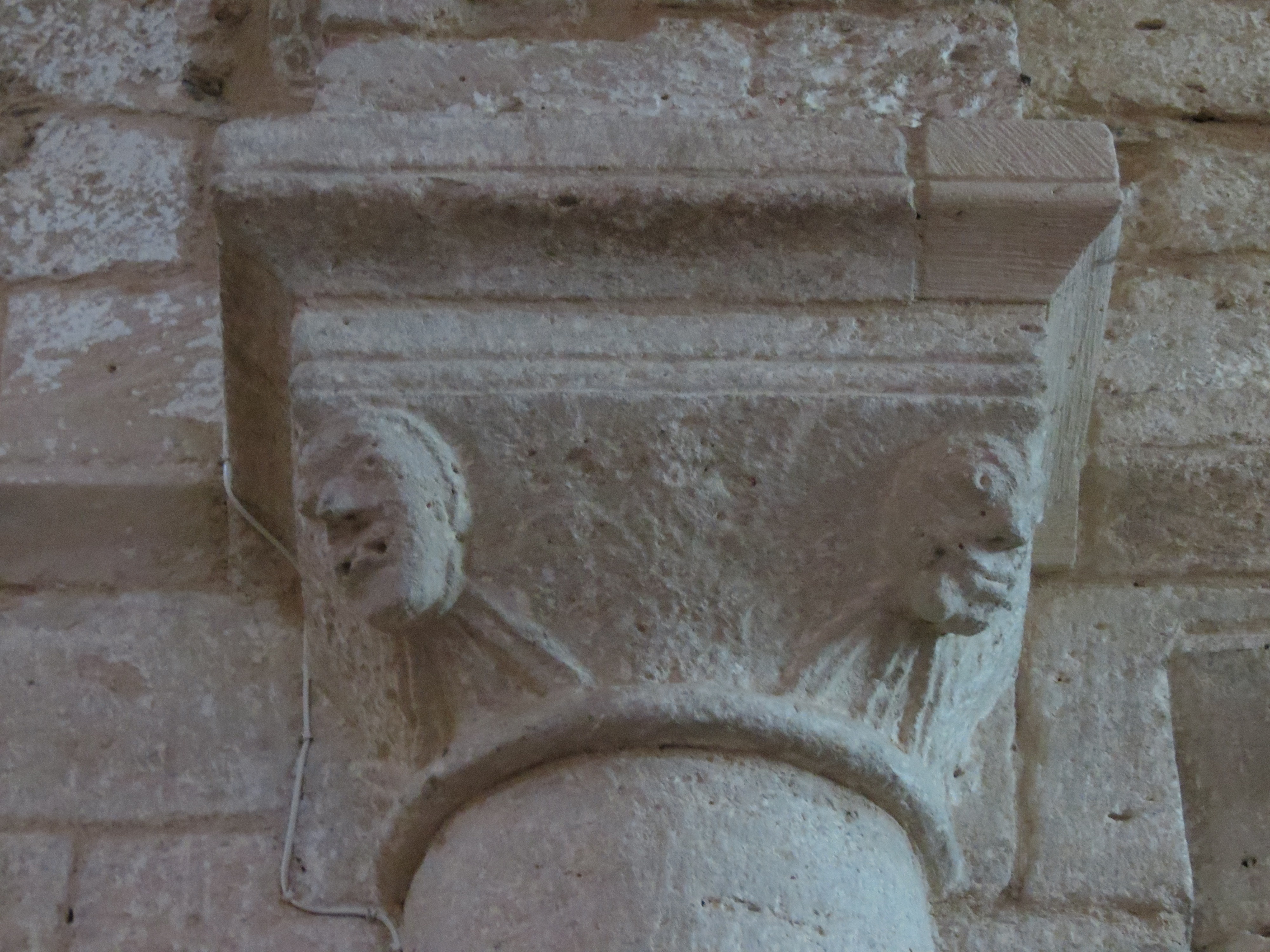 Abbaye de Lessay - chapiteau de la nef